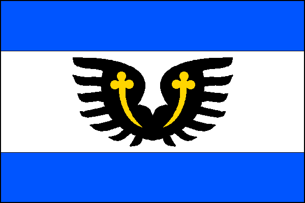 vlajka, Dolní Heřmanice, okres Žďár nad Sázavou